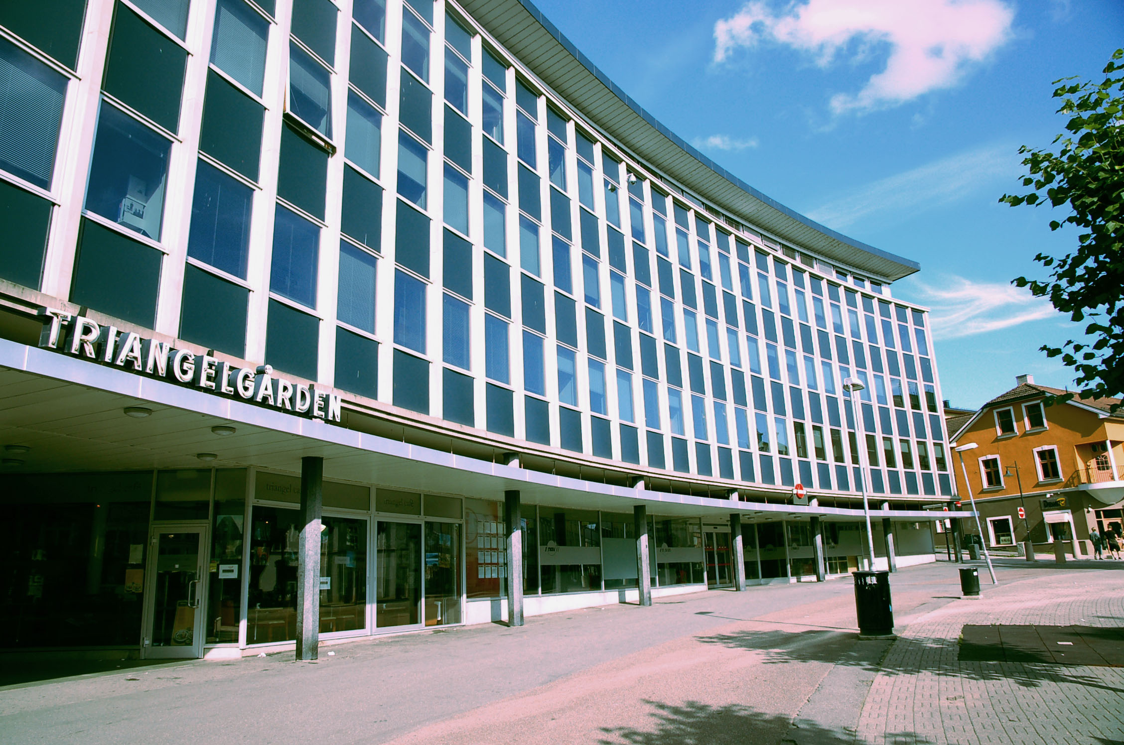 Hamar